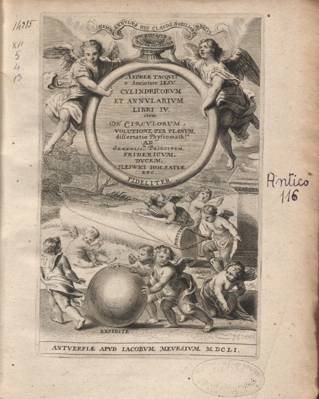 Frontespizio